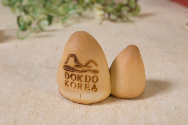 독도만주 사진